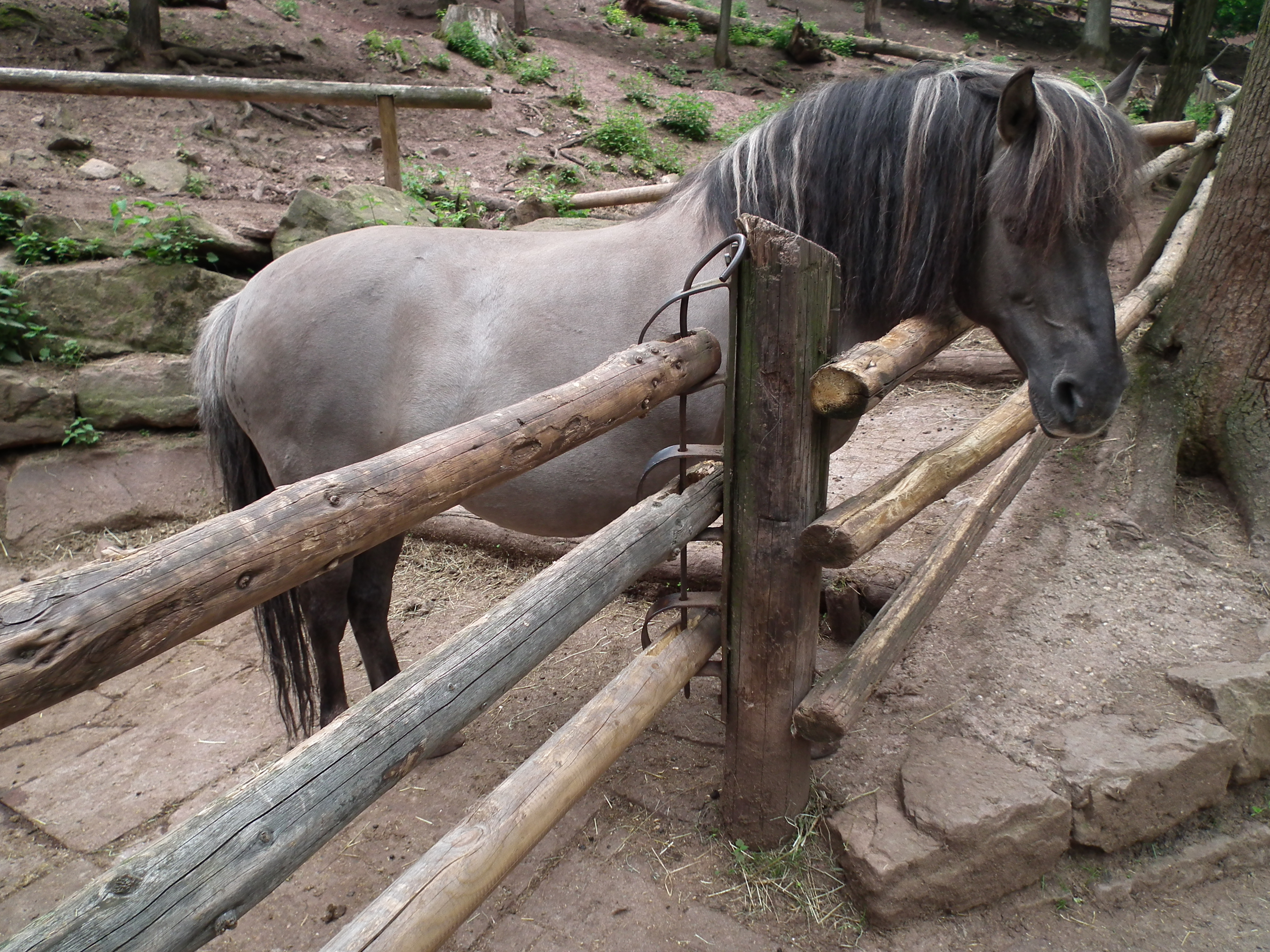 Zuchtpaar einer Rückzüchtung des Tarpan im Wildpark Tripsdrill (Baden-Württemberg, Deutschland)